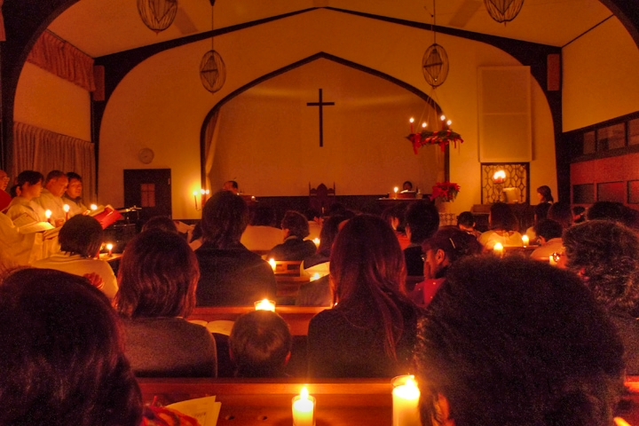 Konan Church：甲南教会／聖夜